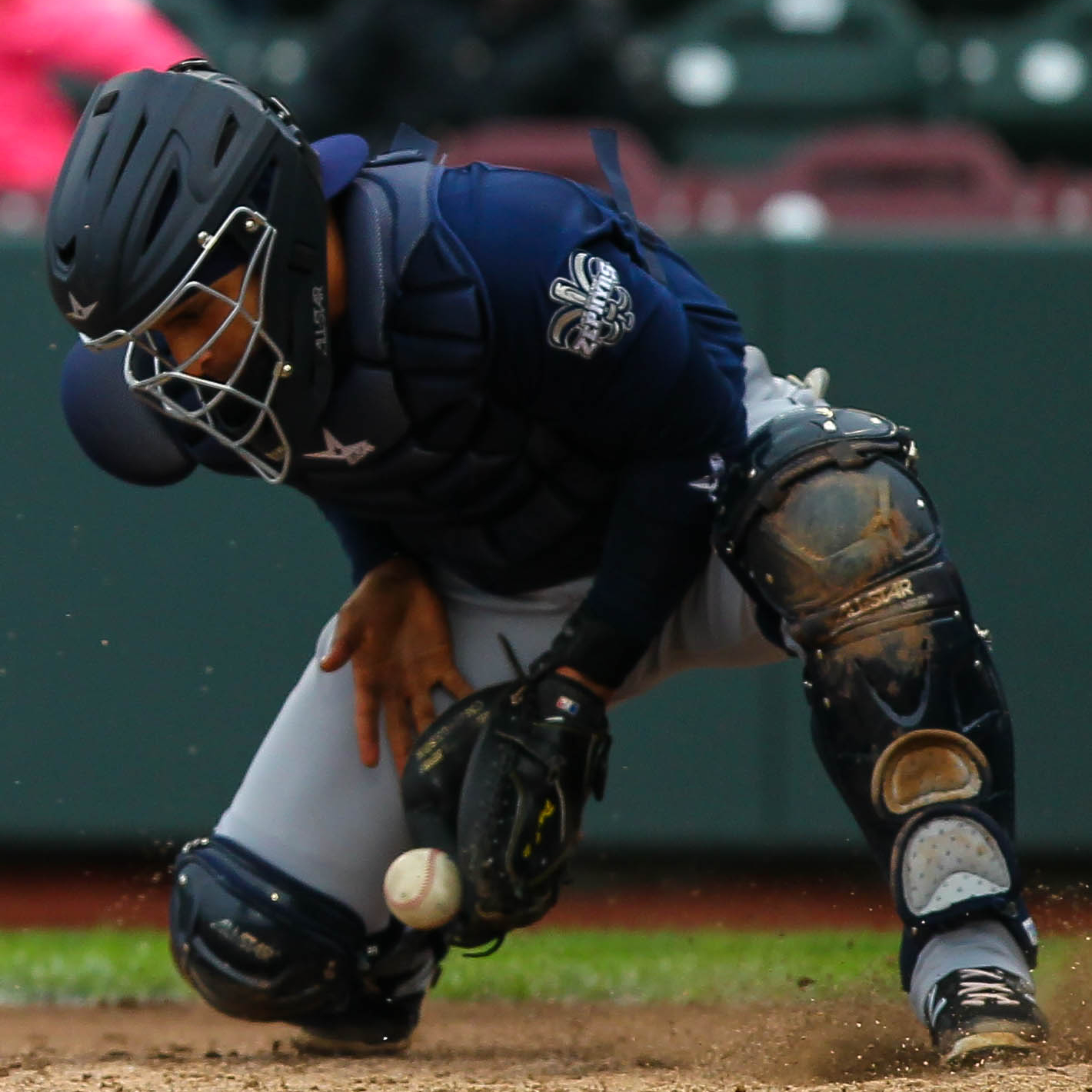 Jhonatan Solano